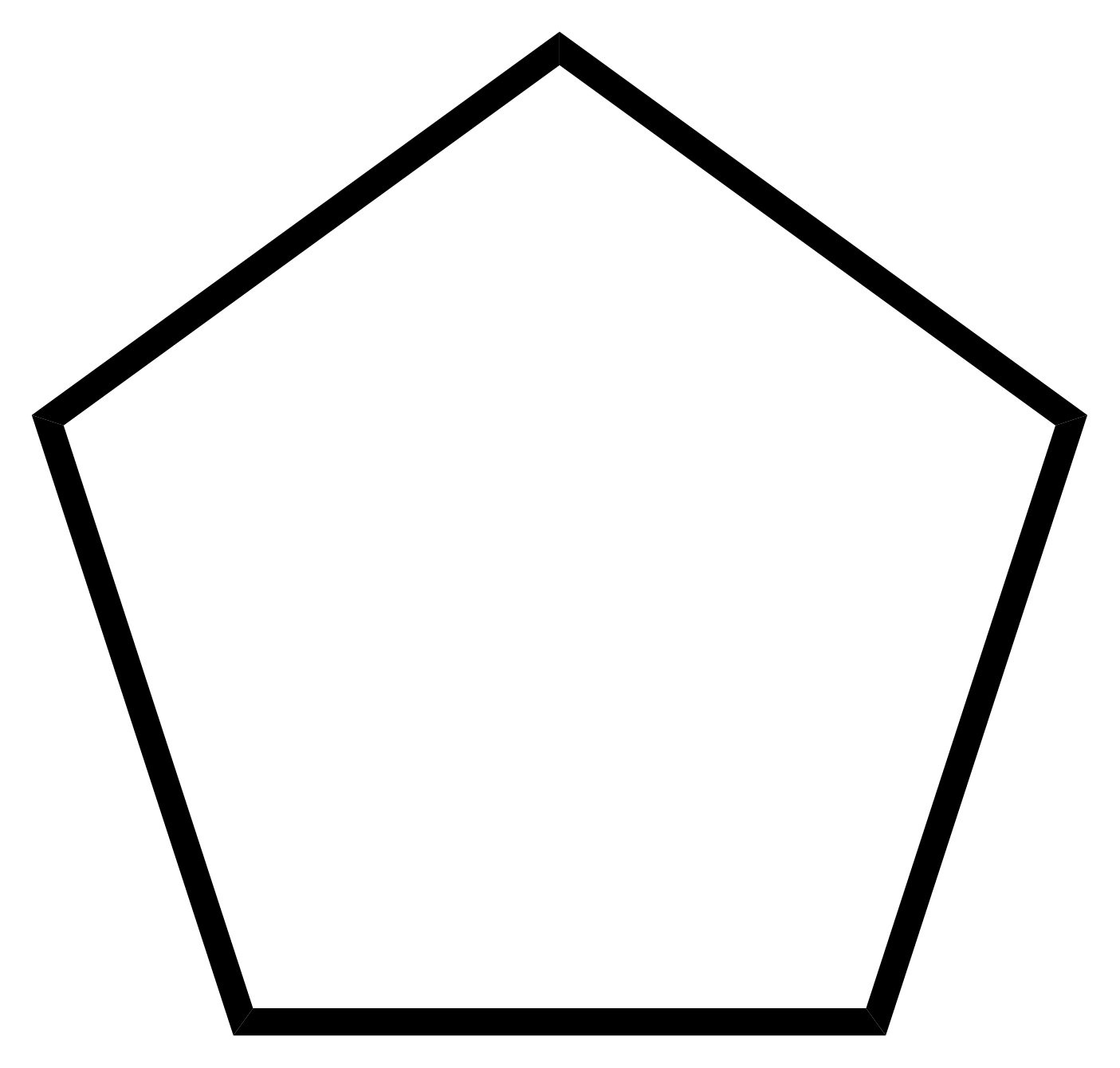 2d molecular structure of Cyclopentane